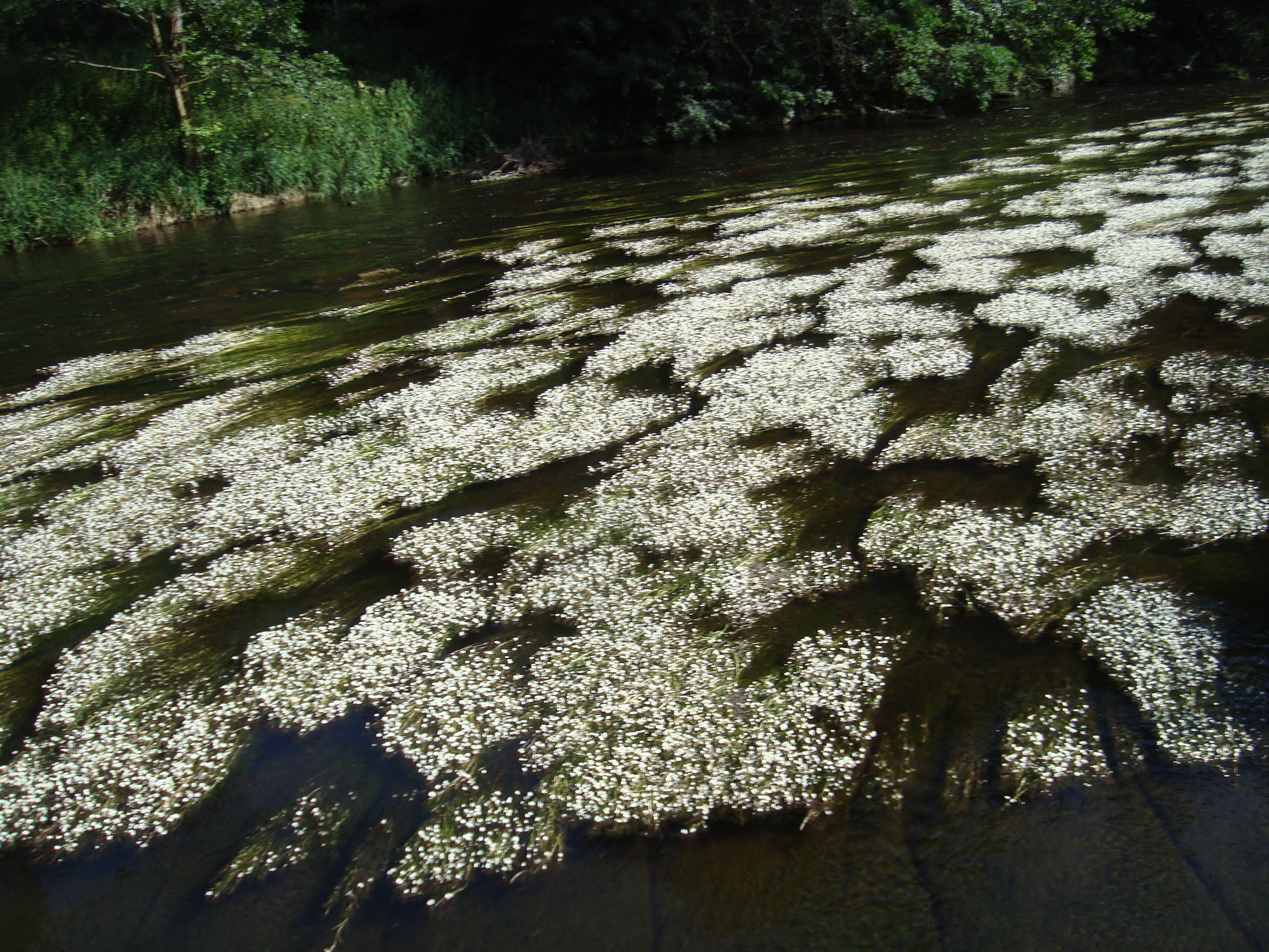 Přírodní park Střední Pojihlaví, Česká republika, jižní Morava